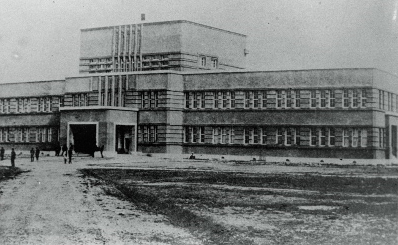 평양의학전문학교